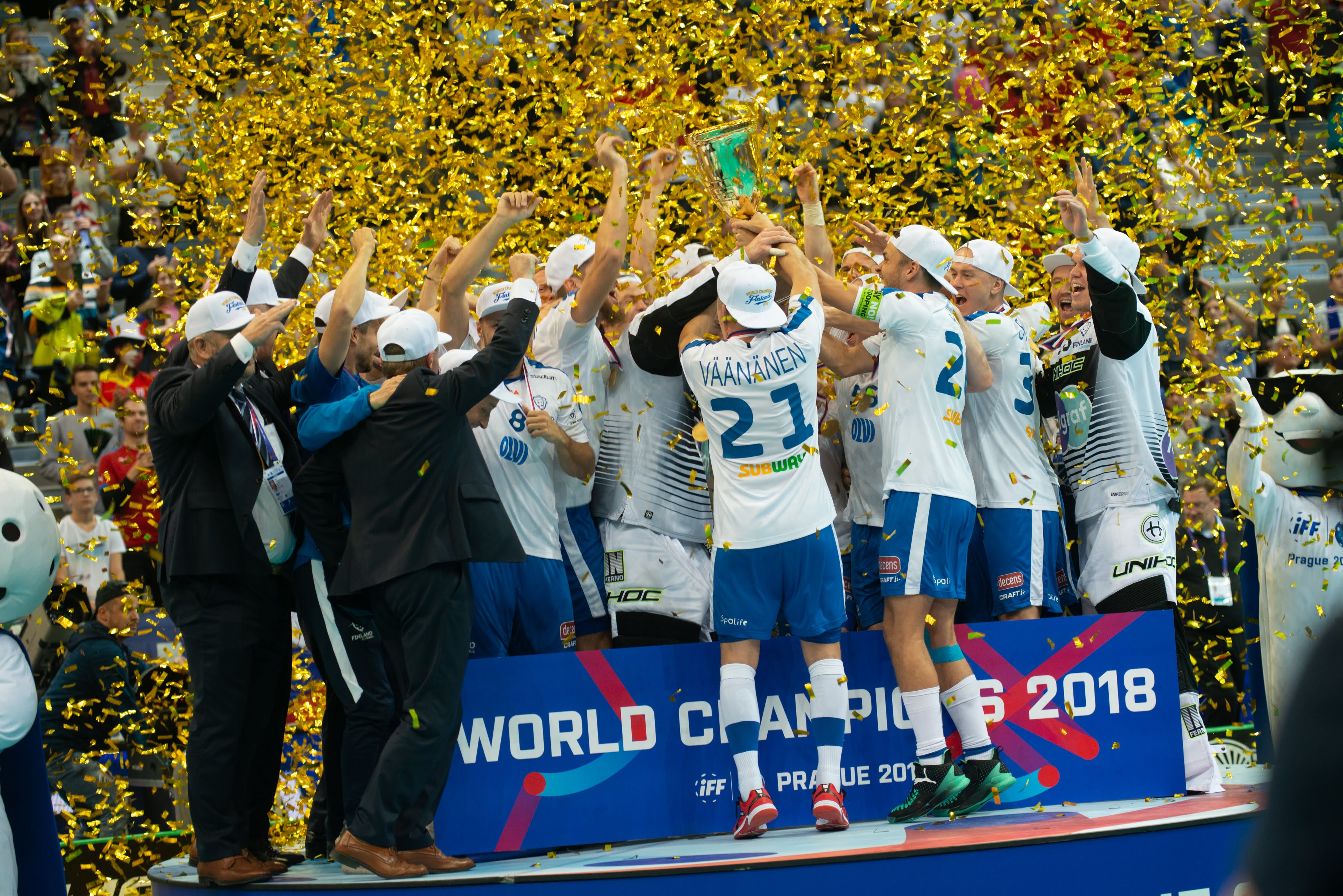 Celebrating after a 6-3 win over Sweden in the final